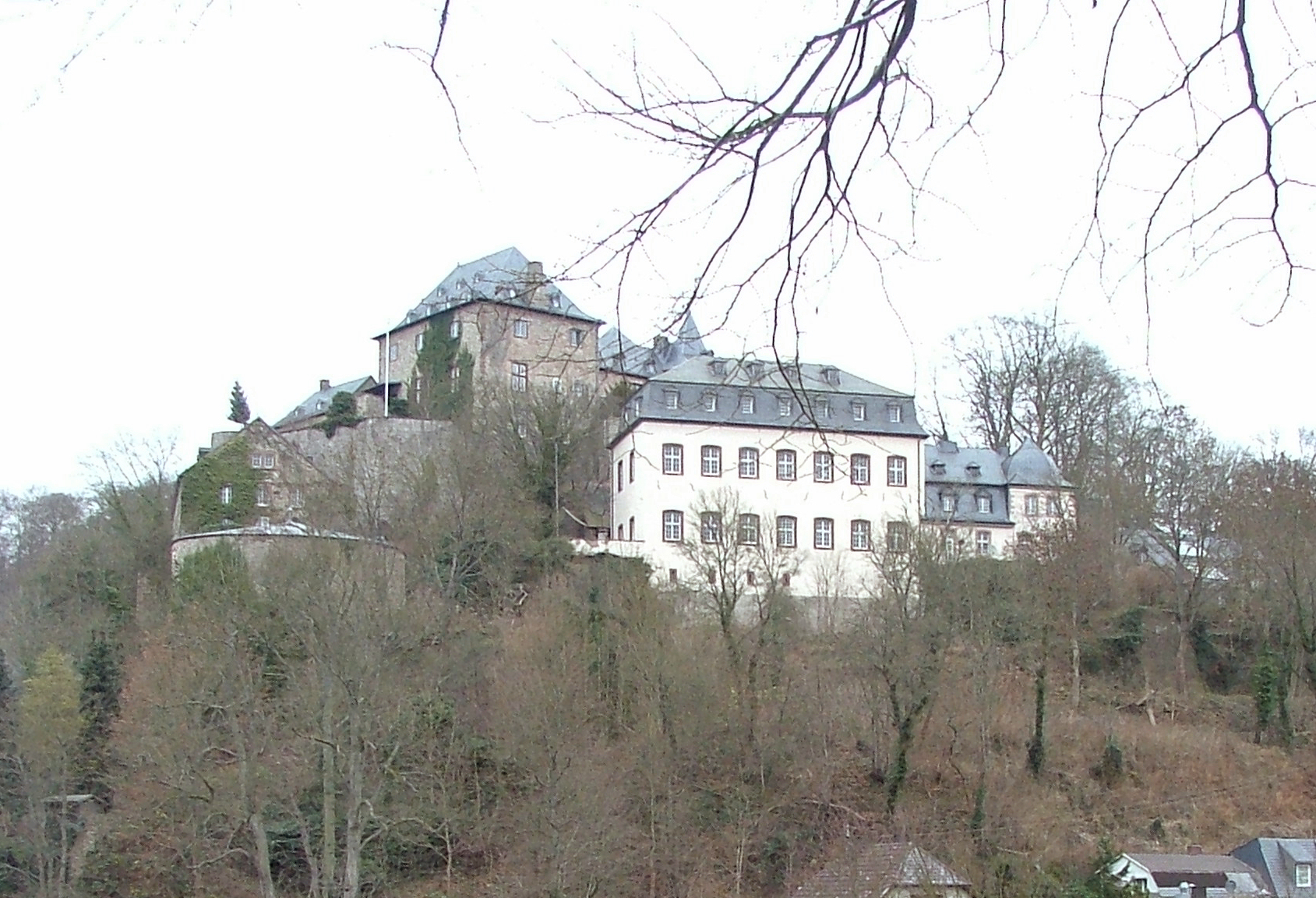 Die Burg Blankenheim in Blankenheim, Nordrhein-Westfalen